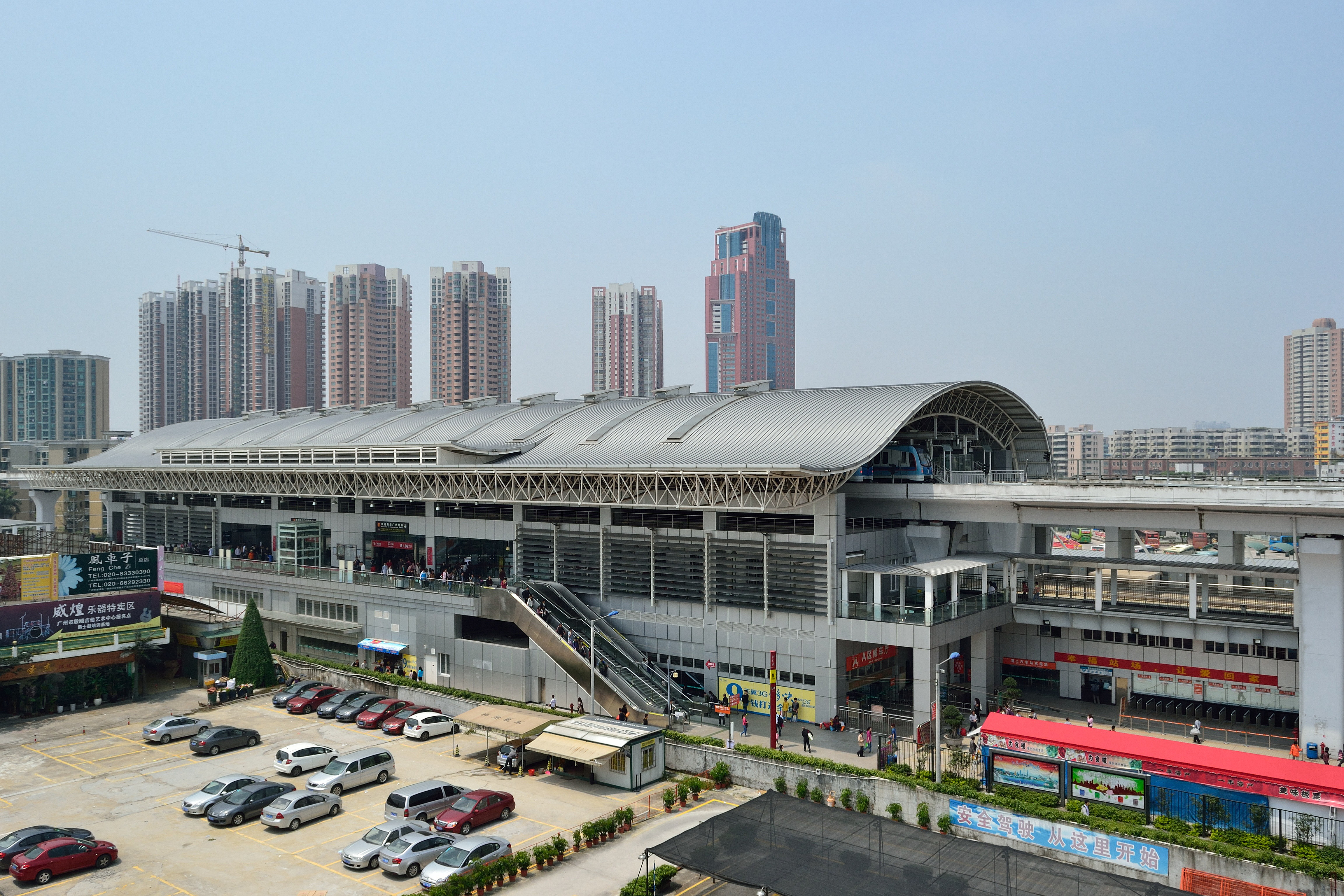 广州地铁五号线滘口站。